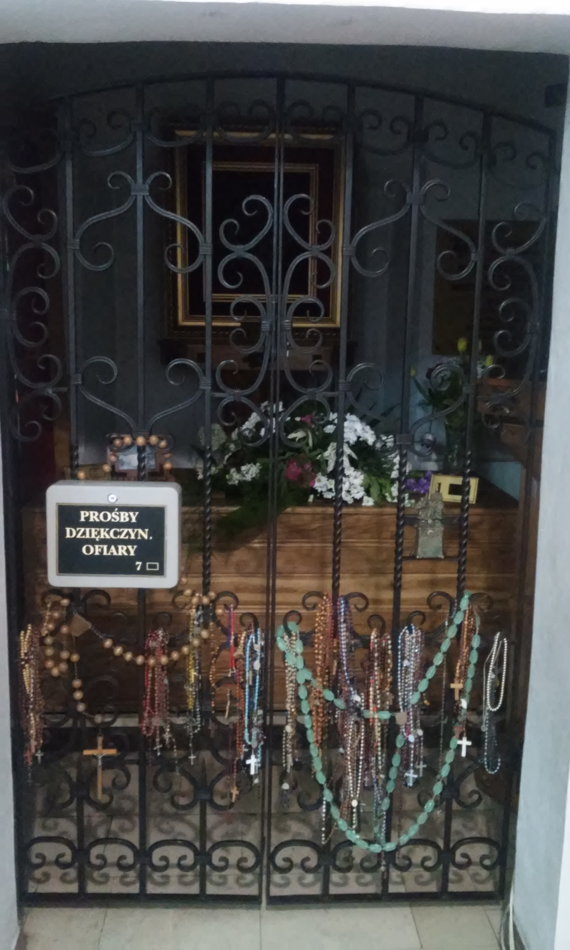 Relikwiarz męczenników unickich w kościele w Pratulinie